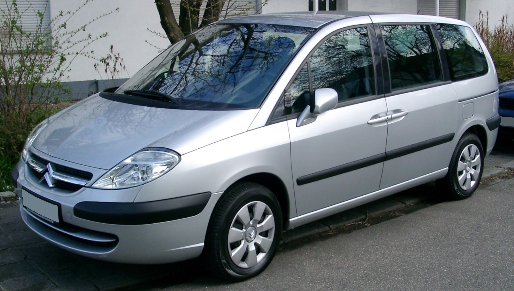 Citroen C8